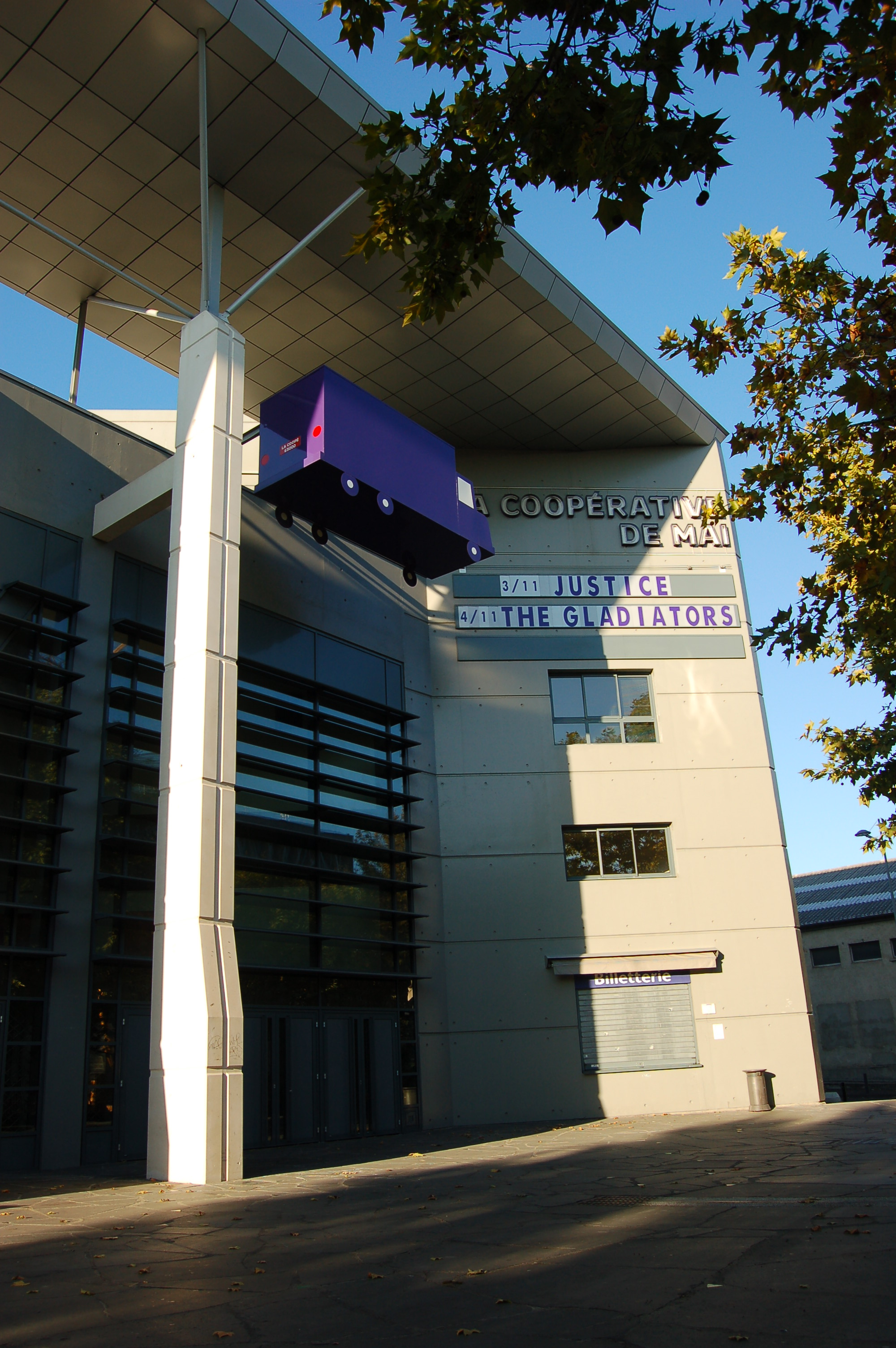 La Coopérative de Mai (Clermont-Ferrand, France)